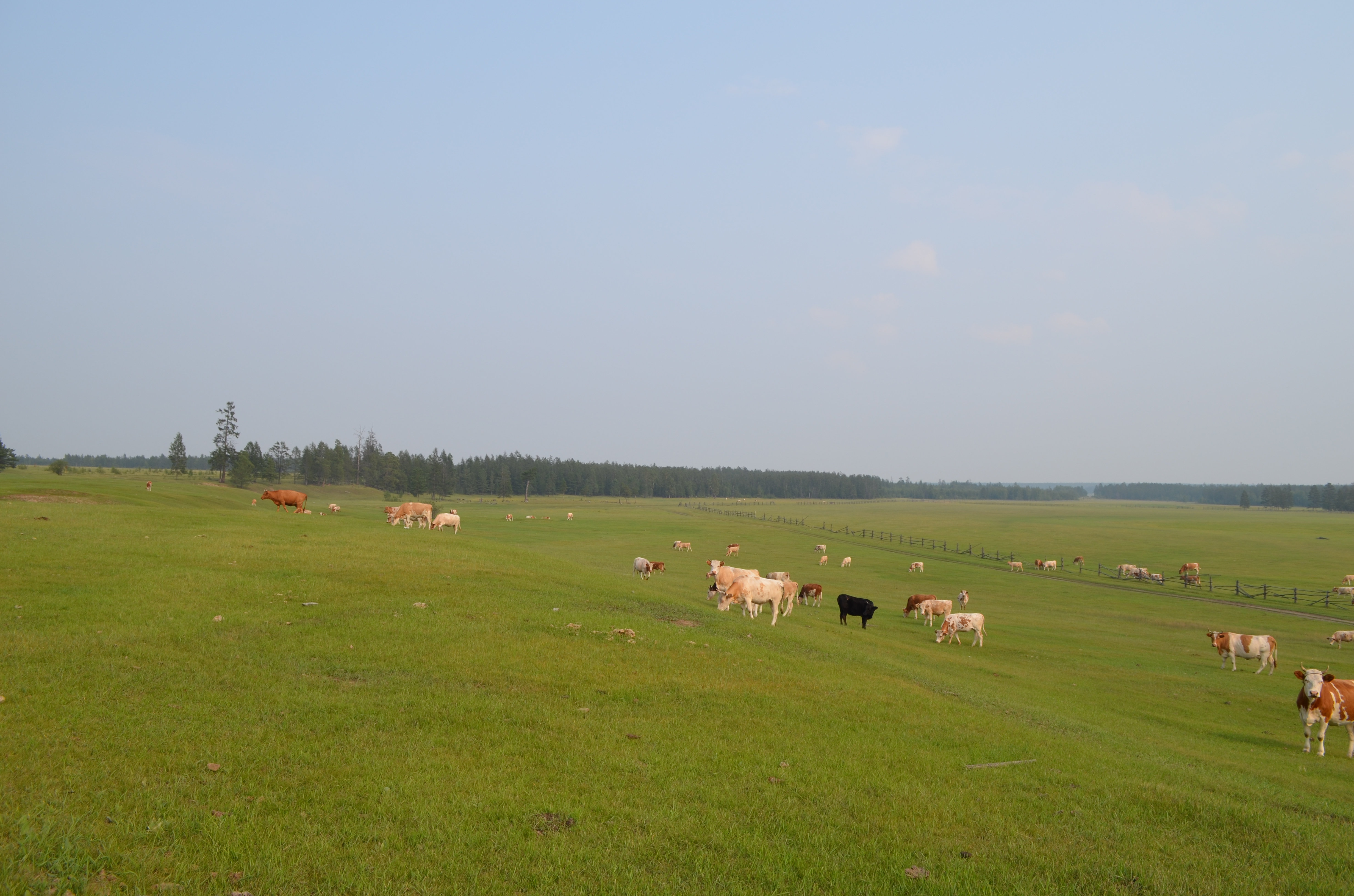 Село Майя Мегино-Кангаласского района Якутии. Крупное якутское село, население (на 2016) приближается к 10 тысячам жителей. В 1930-2007 годах село было центром Мегино-Кангаласского района (улуса). Населяют село преимущественно якуты. Оно также является малой родиной автора этих снимков, хотя я не был тут с 1993 года, то есть 23 года! Понятно, что с тех пор оно очень изменилось.